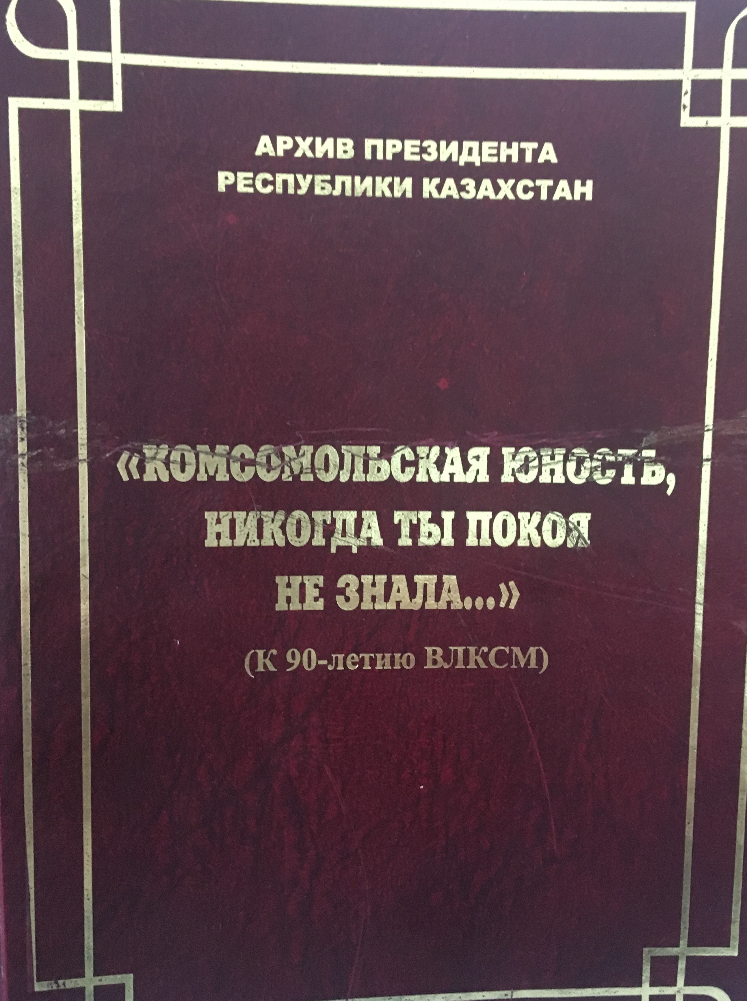 Книга о комсомольцах